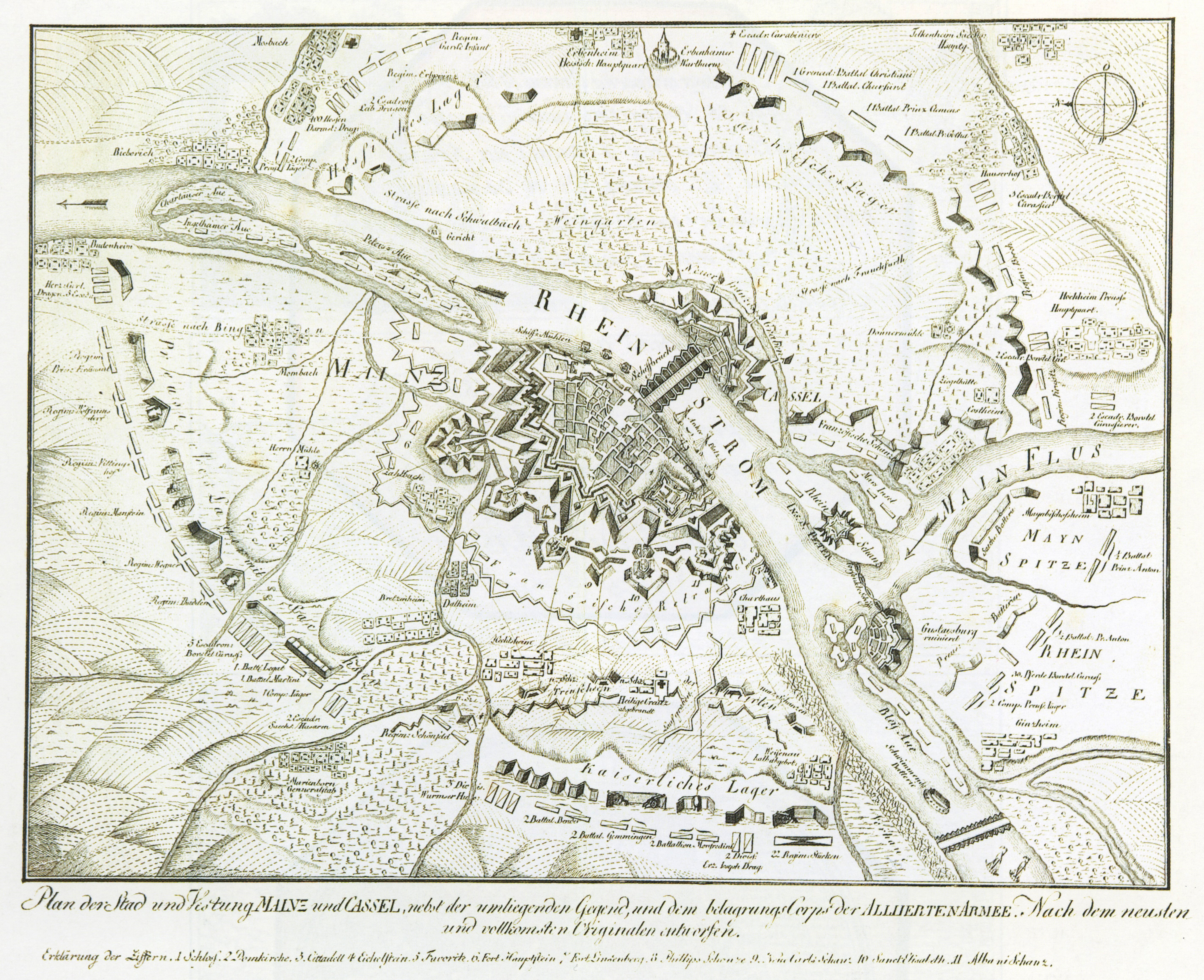 План города Майнца с окрестностями